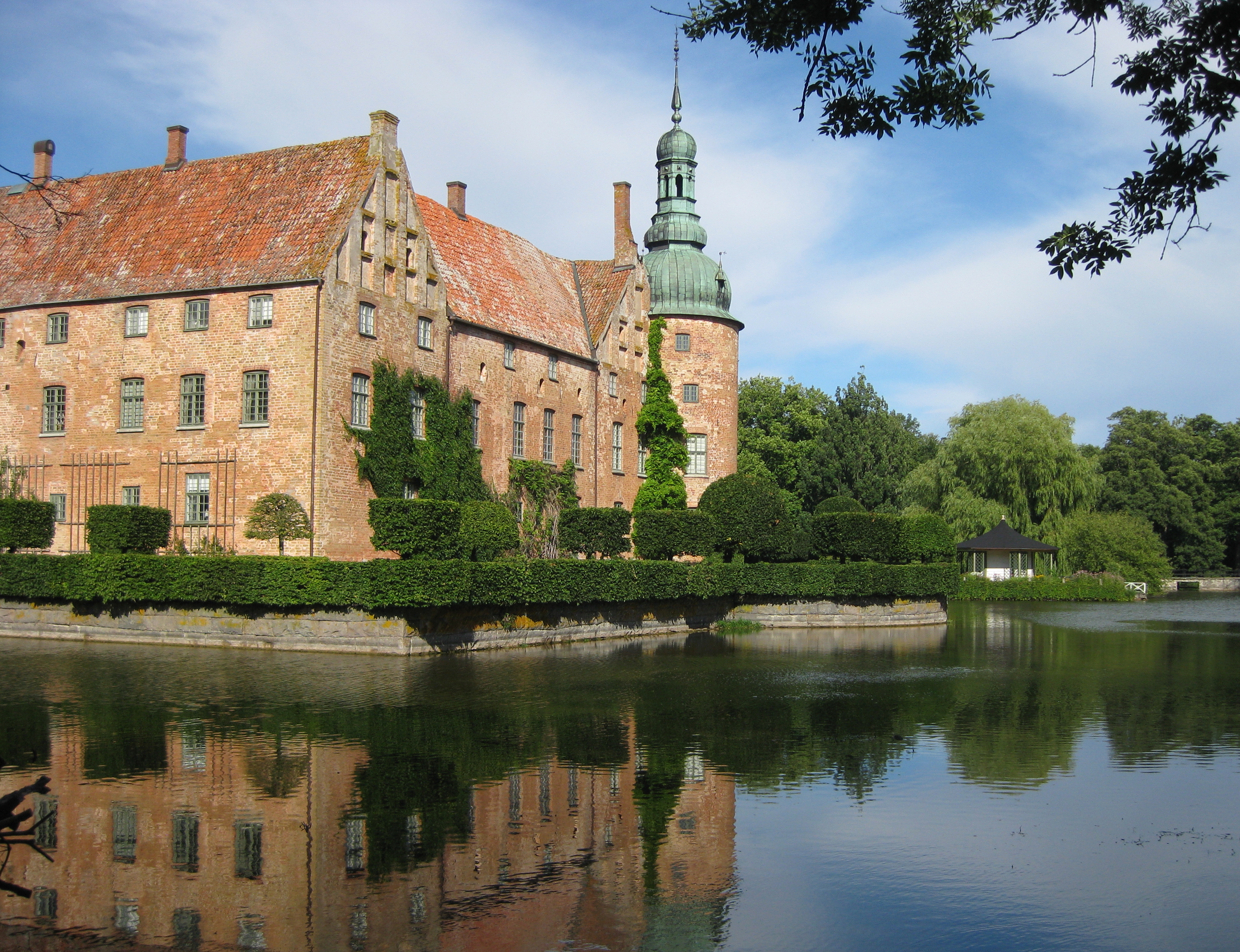 Vittskövle slott i Skåne